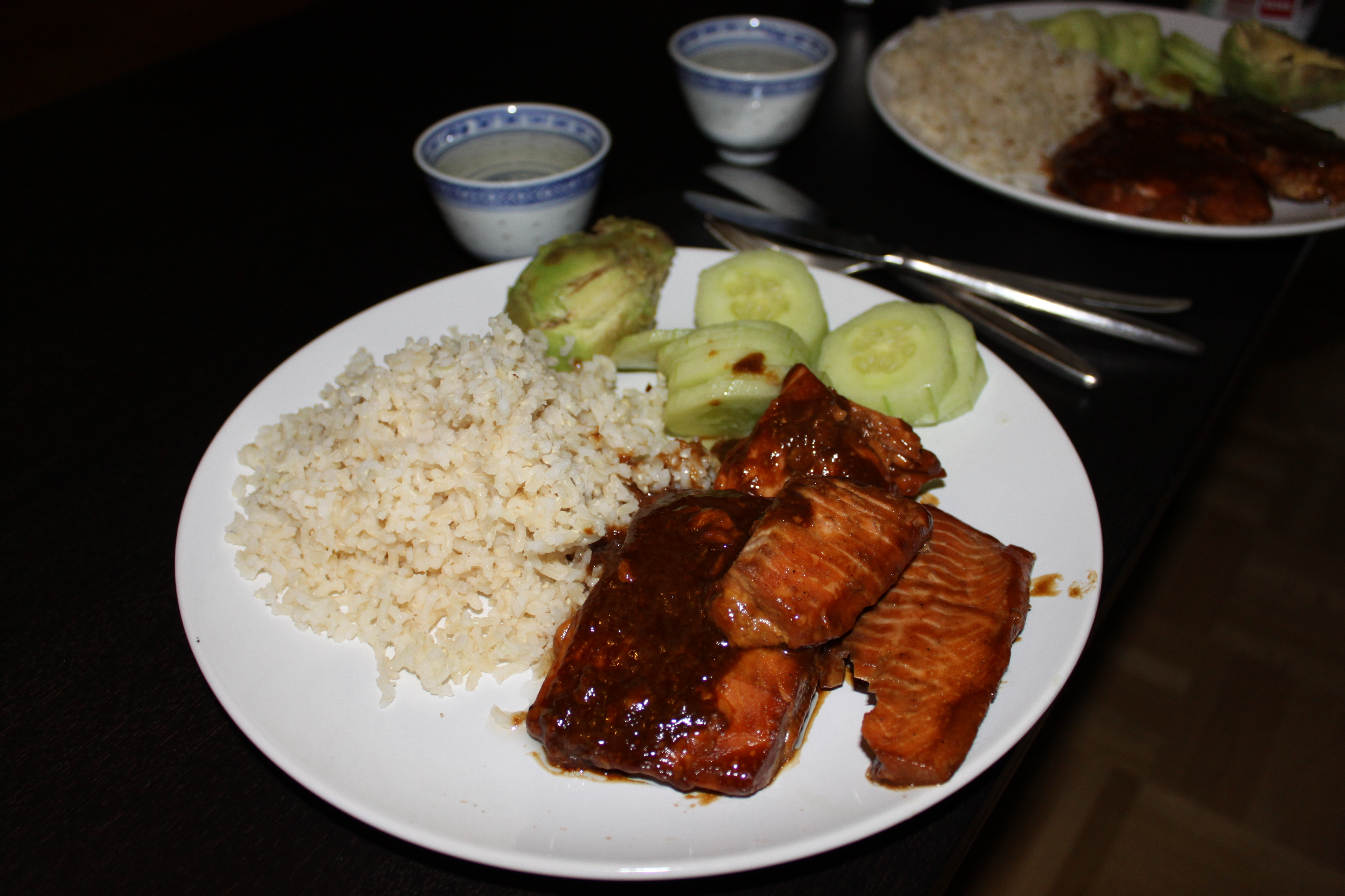 Lachs mit Teriyaki-Soße, ungeschältem Reis, Gurke, Avocado